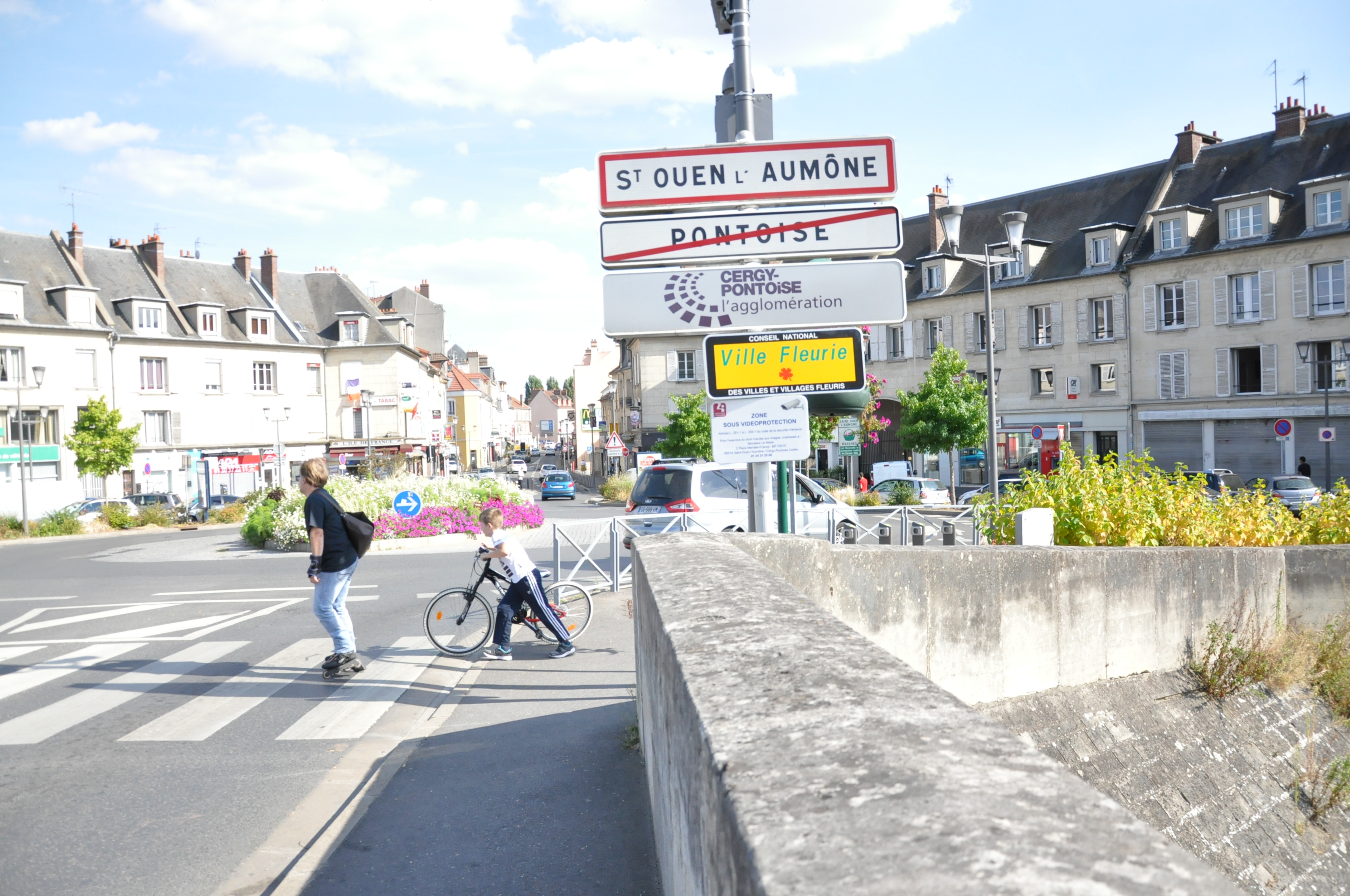 Entrée de Saint-Ouen l'Aumône